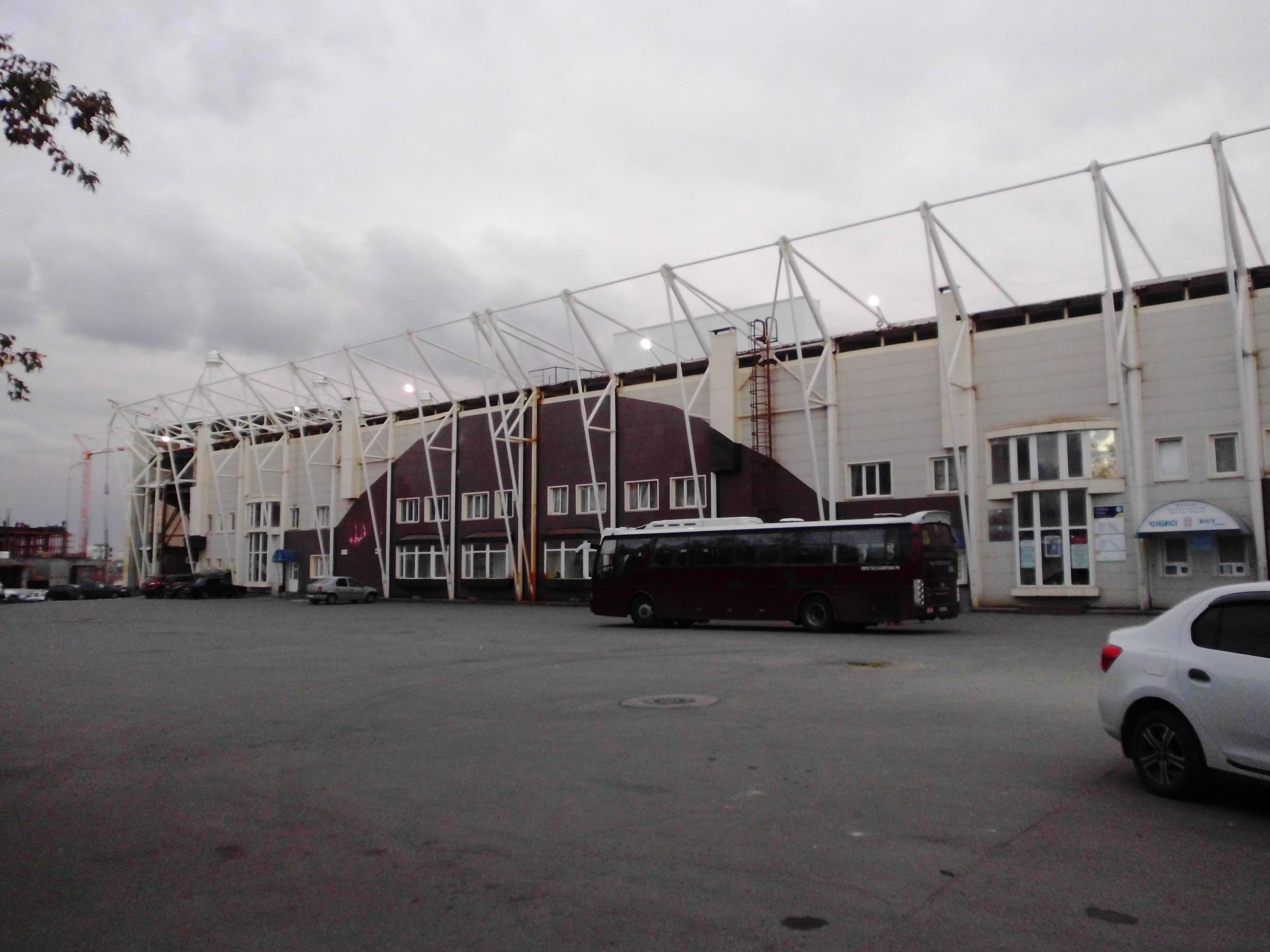 Стадион "Центральный" в городе Челябинске. Улица Коммуны, 98. Передний (северо-восточный) фасад.